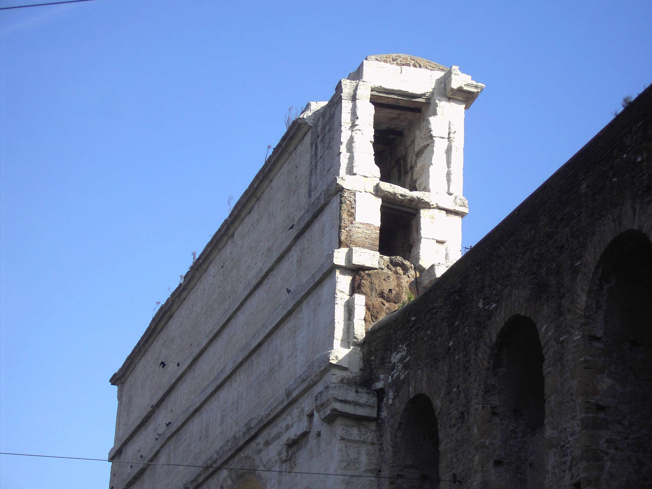 Roma, Porta Maggiore: le condotte principali.